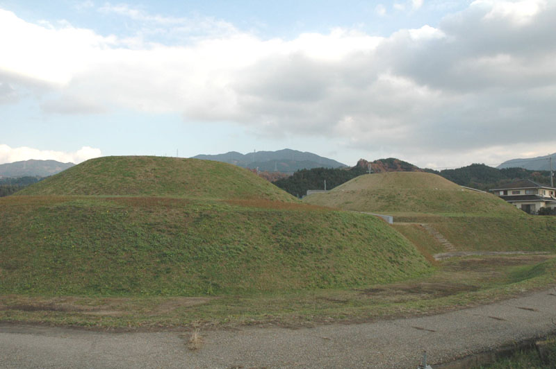 大阪府南河内郡河南町にある金山古墳（双円墳）の画像。